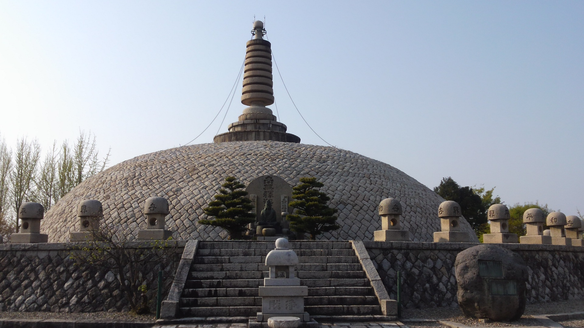 鉢伏山の頂上にある仏舎利塔。二上山のシンボル的な存在である。